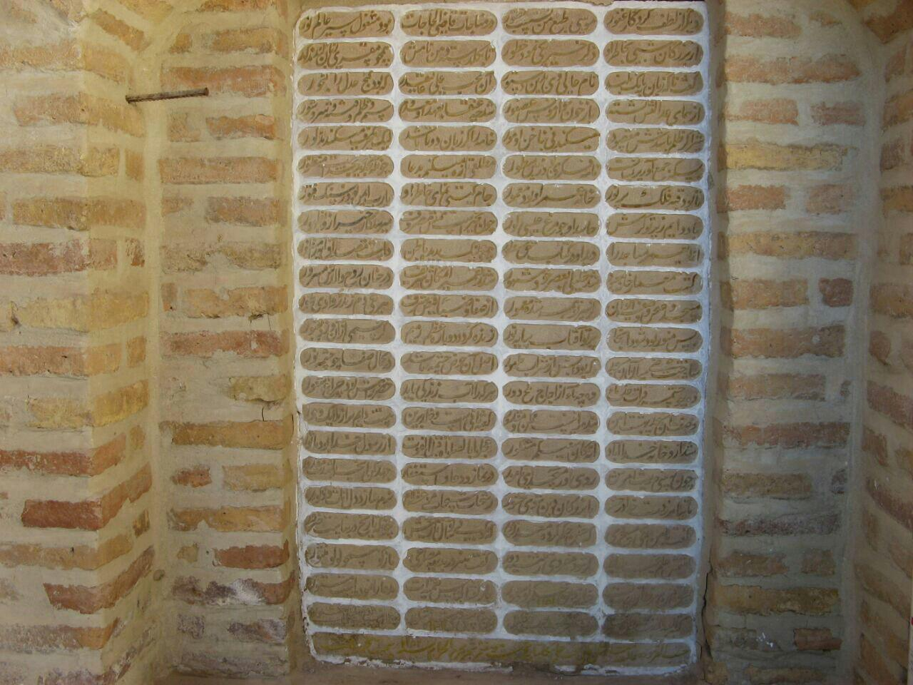 کتیبه تاریخ بازسازی مسجد جامع کیان متعلق به سنه ۱۱۵۲ هجری قمری که بدستور محبعلی بیگ و به دست استاد سهلعلی هفشجانی نقر گردیده است.